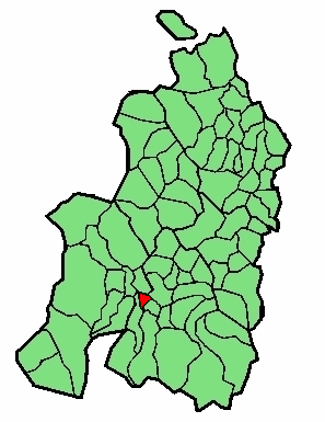 Donibane Garaziren kokapena Nafarroa Beherean